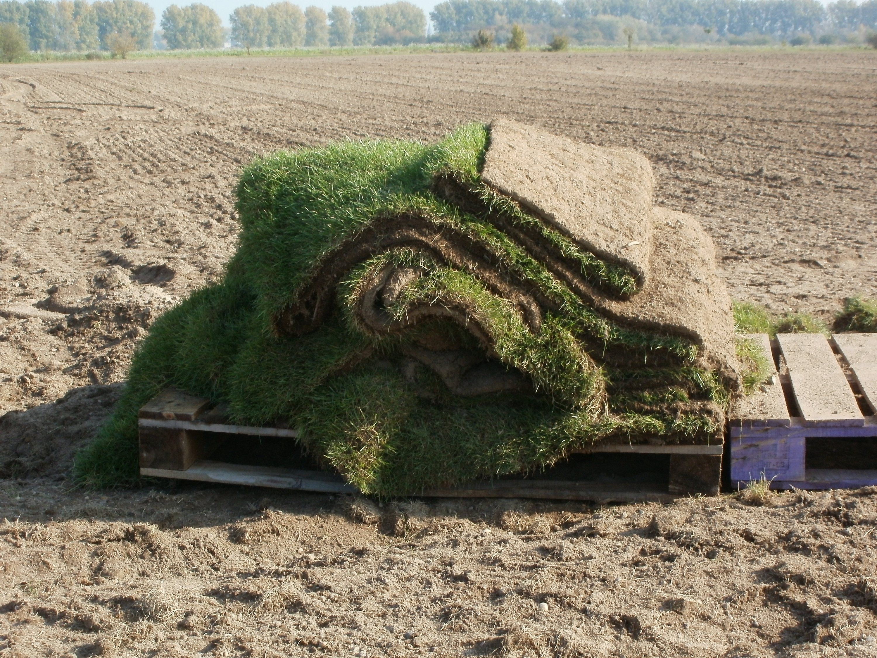 Rollrasenfeld bei Reilingen